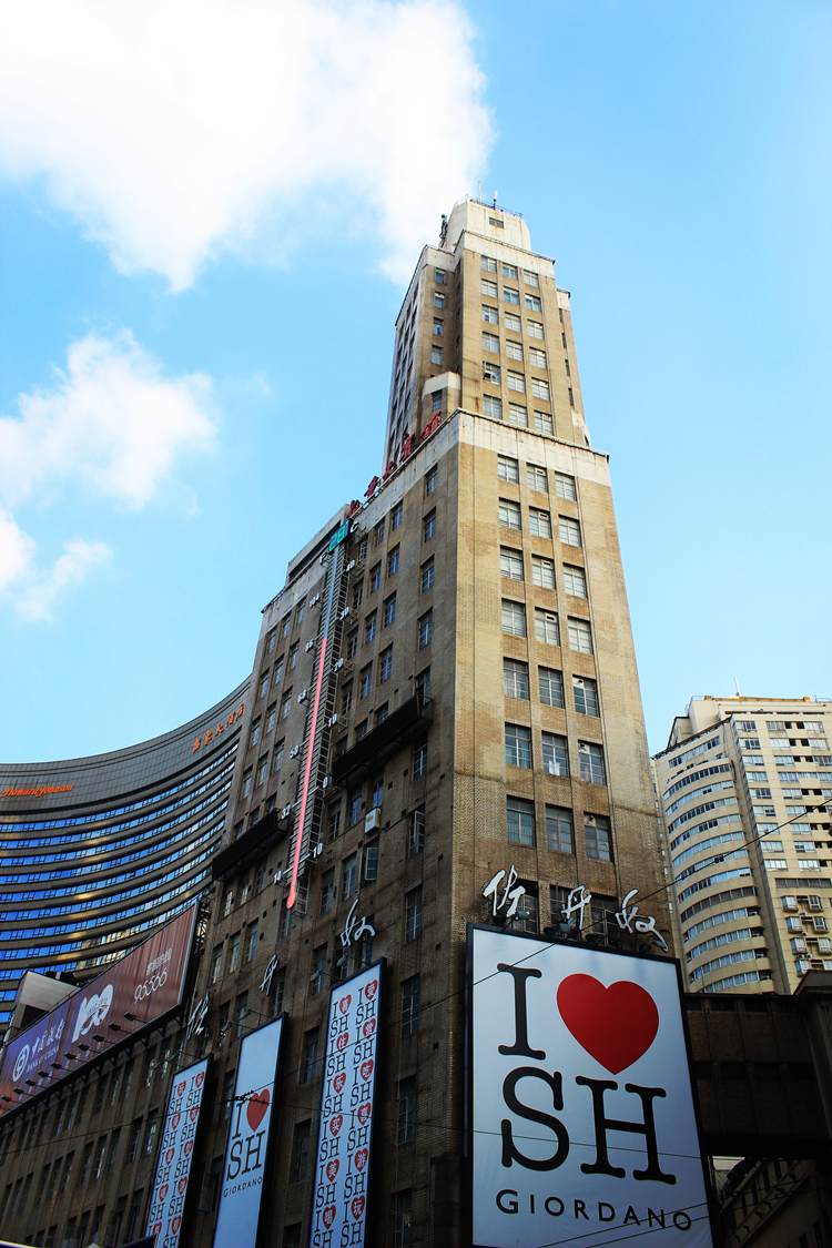 新永安大厦（七重天宾馆）